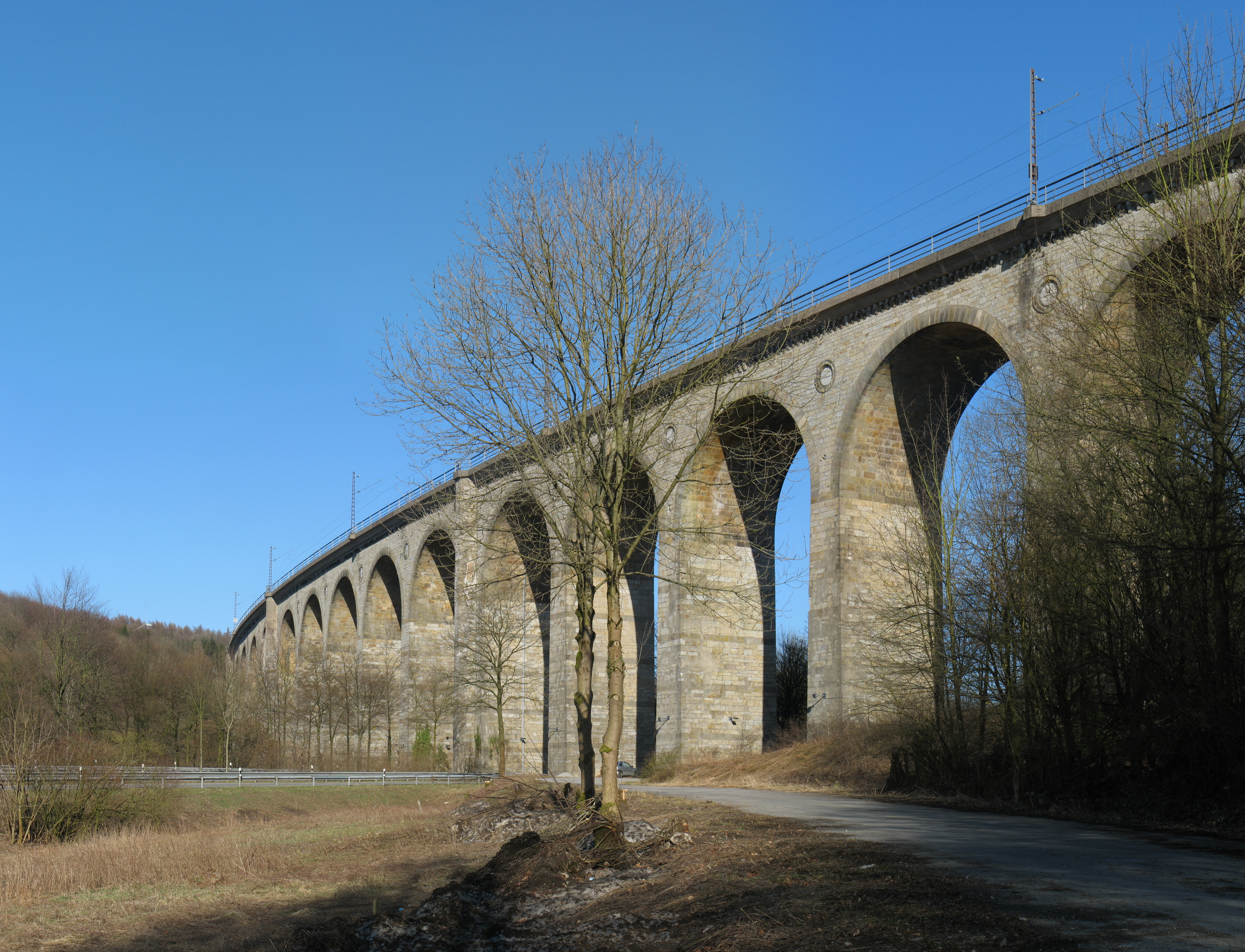 Eisenbahnviadukt in Altenbeken – mittels hugin erstelltes Panoramabild.